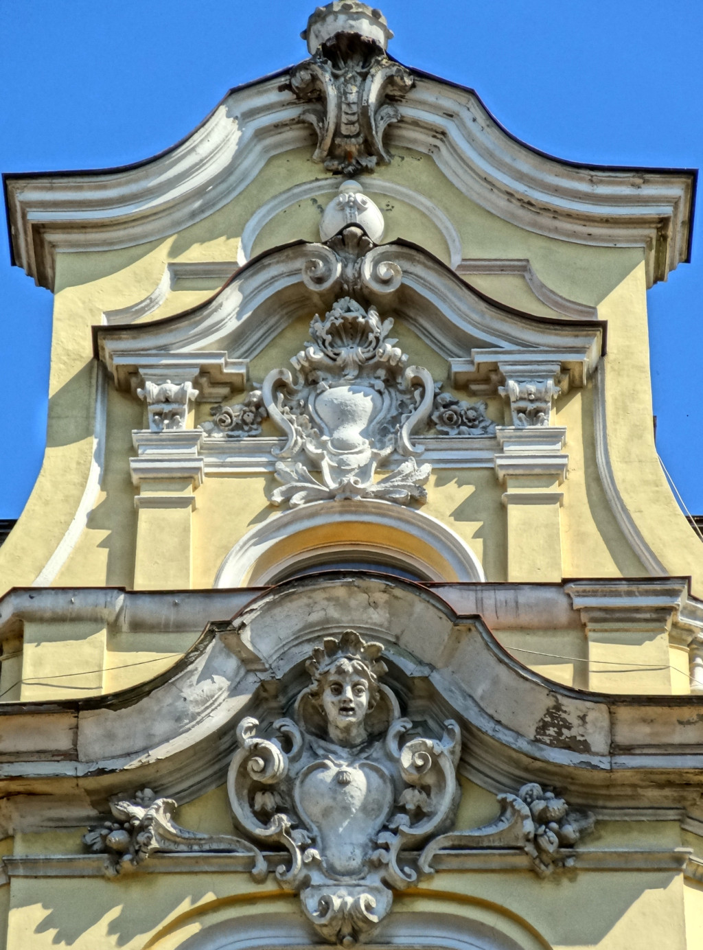 Kamienica Plac Wolności 1 w Bydgoszczy, róg ul. Gdańskiej (1898, aut. Józef Święcicki)